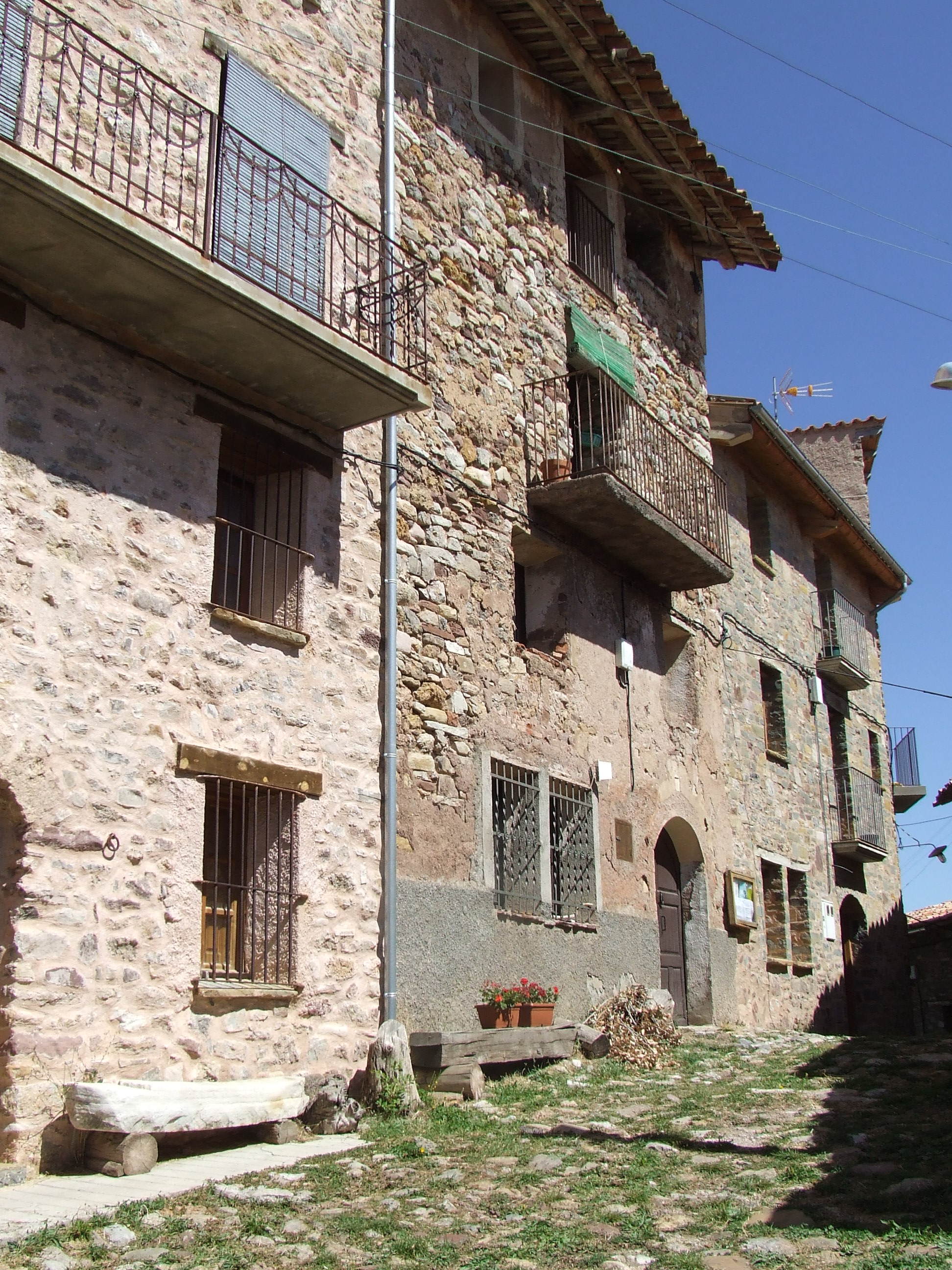 Cases d'Antist (la Pobleta de Bellveí, la Torre de Cabdella, Pallars Jussà)